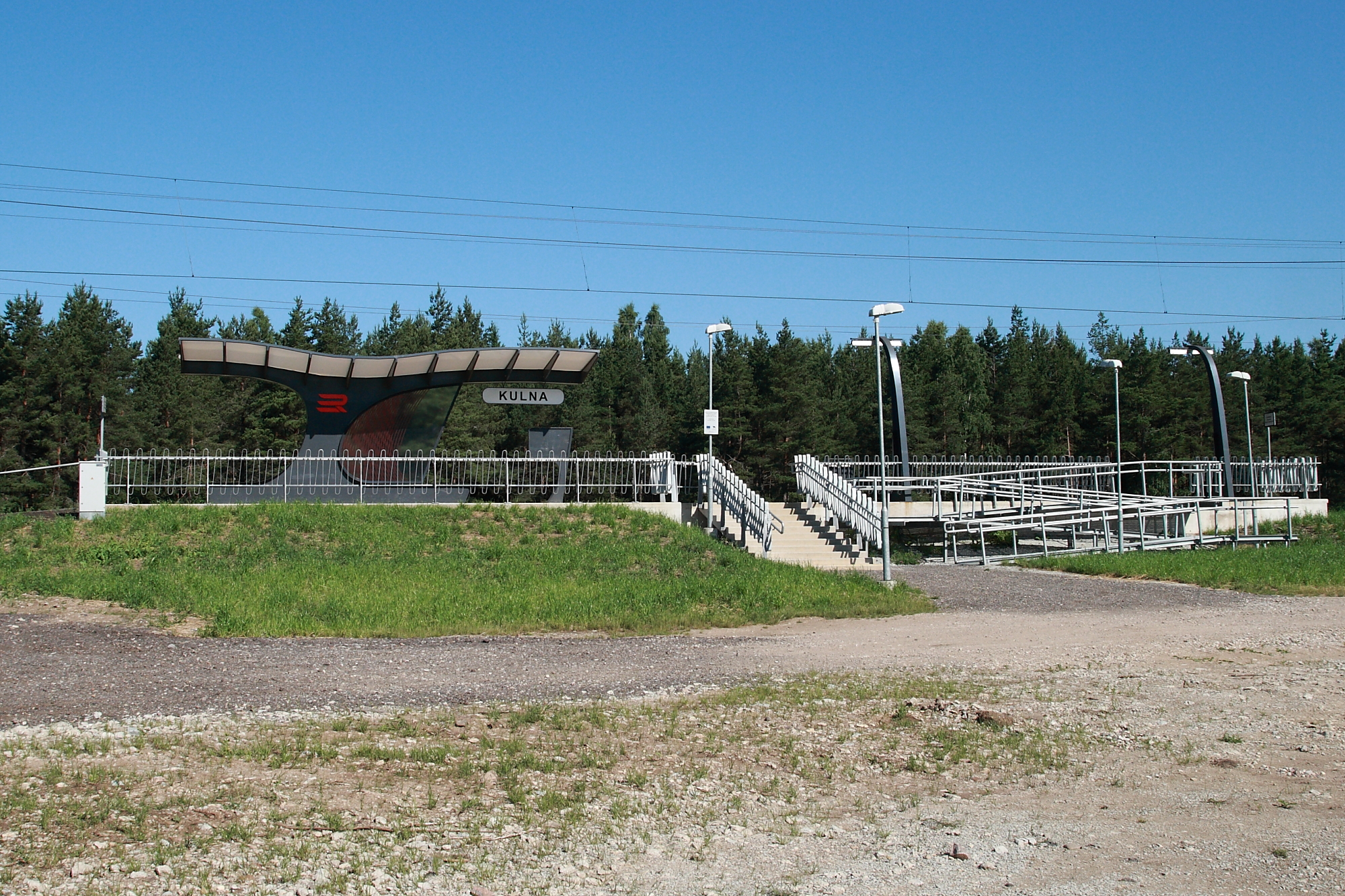 Kulna raudteepeatus, suvi 2011.